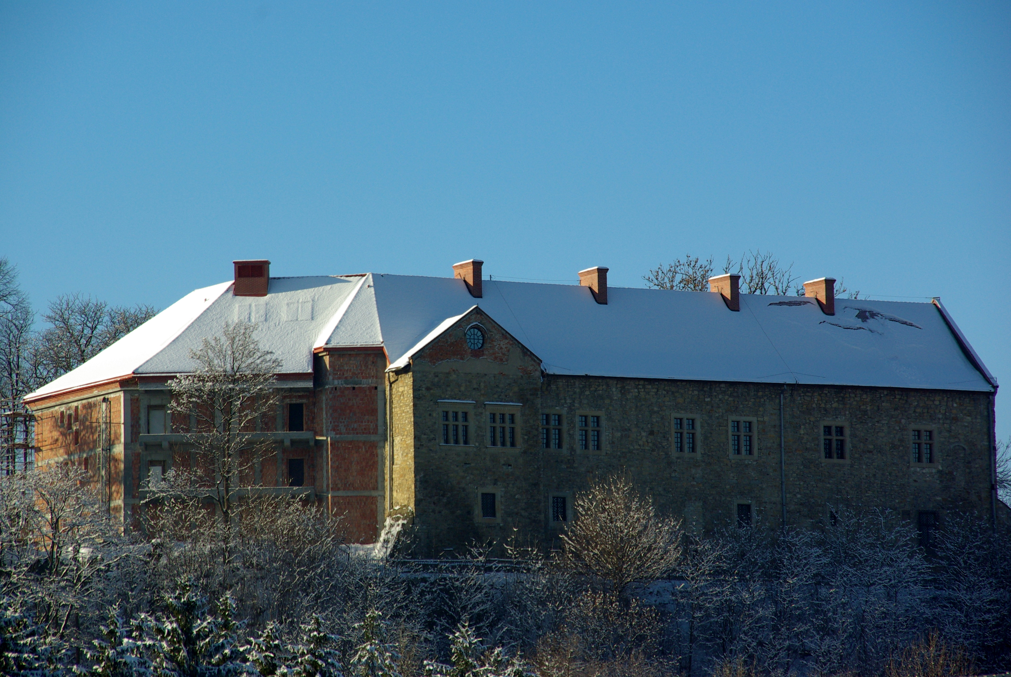 Widok na zamek królewski w Sanoku podczas przebudowy grudzień 2010